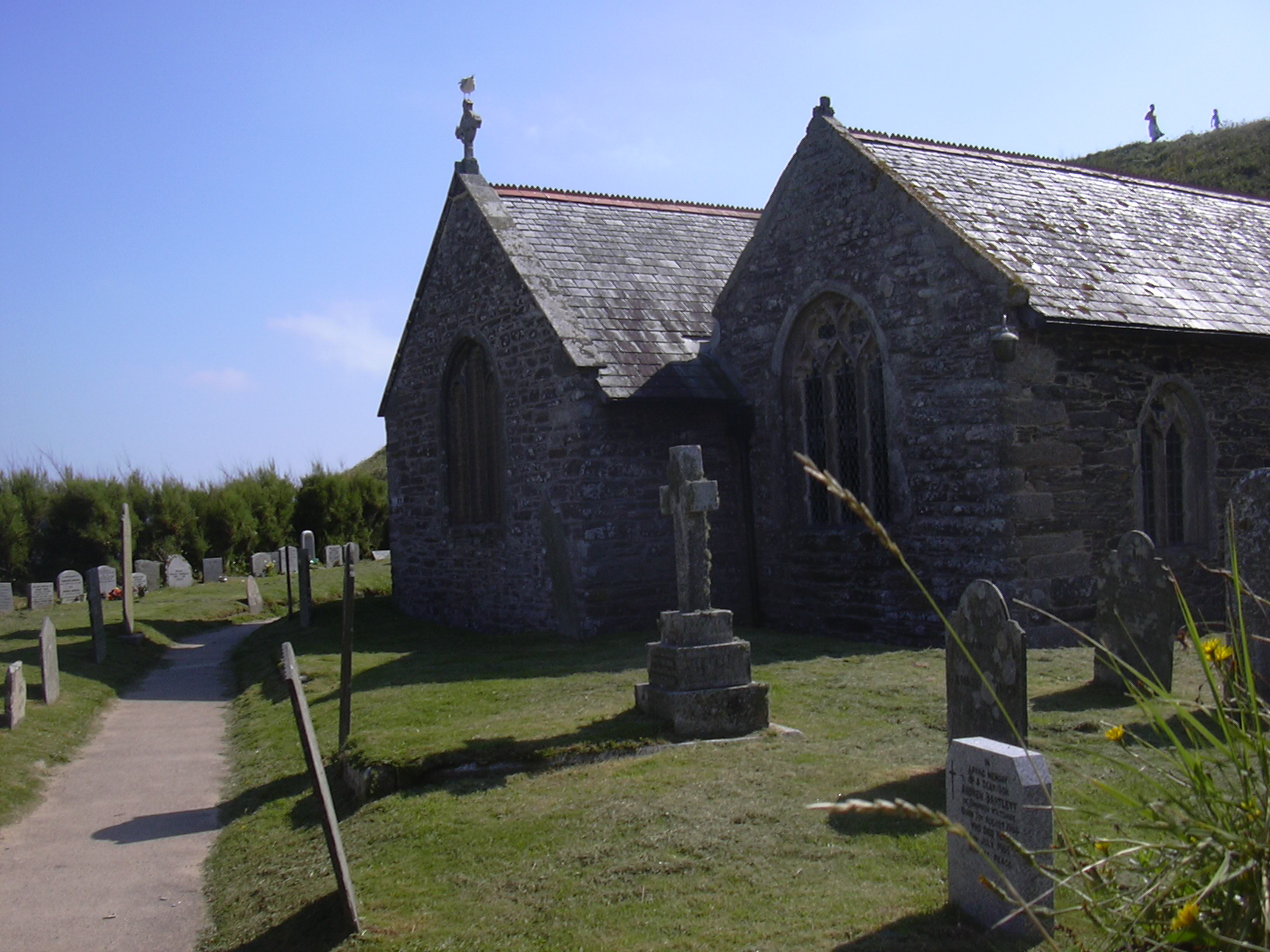 St. Winwaloe Church, Gunwalloe, Cornwall